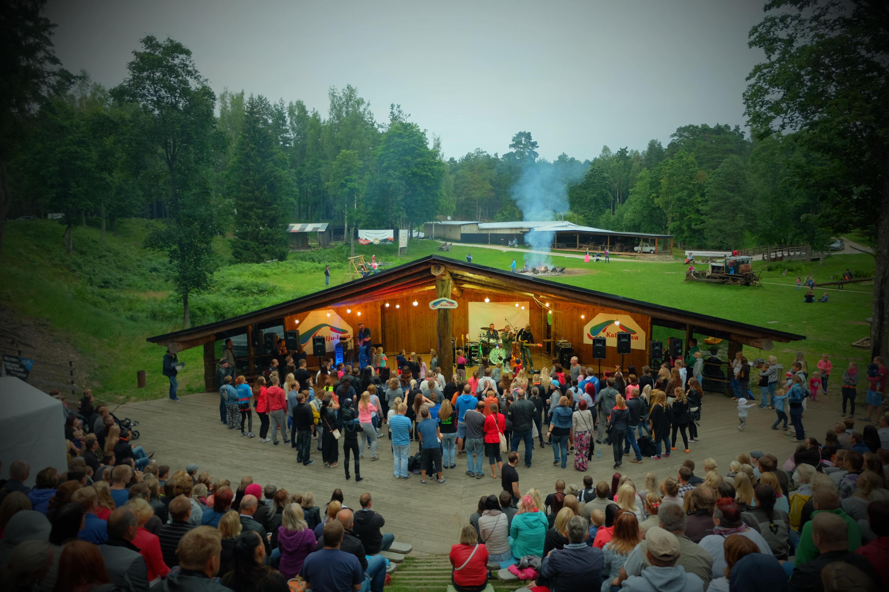 Terminaatori kontsert Kalju-laval